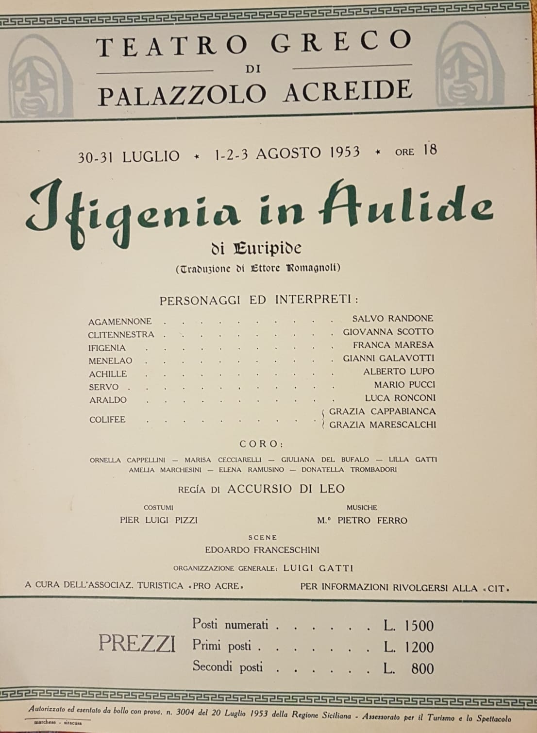 Spettacolo di Teatro Classico svoltosi nel Teatro Greco di Palazzolo Acreide nel 1953 per la regia di Accursio Di Leo , con la partecipazione dei nomi più importanti dell'epoca, nel coro la giovane Marisa Ceciarelli che diverrà famosa come Monica Vitti, altri importanti partecipanti: Salvo Randone , Giovanna Scotto , Franca Maresa , Gianni Galavotti , Alberto Lupo , Luca Ronconi , Mario Pucci